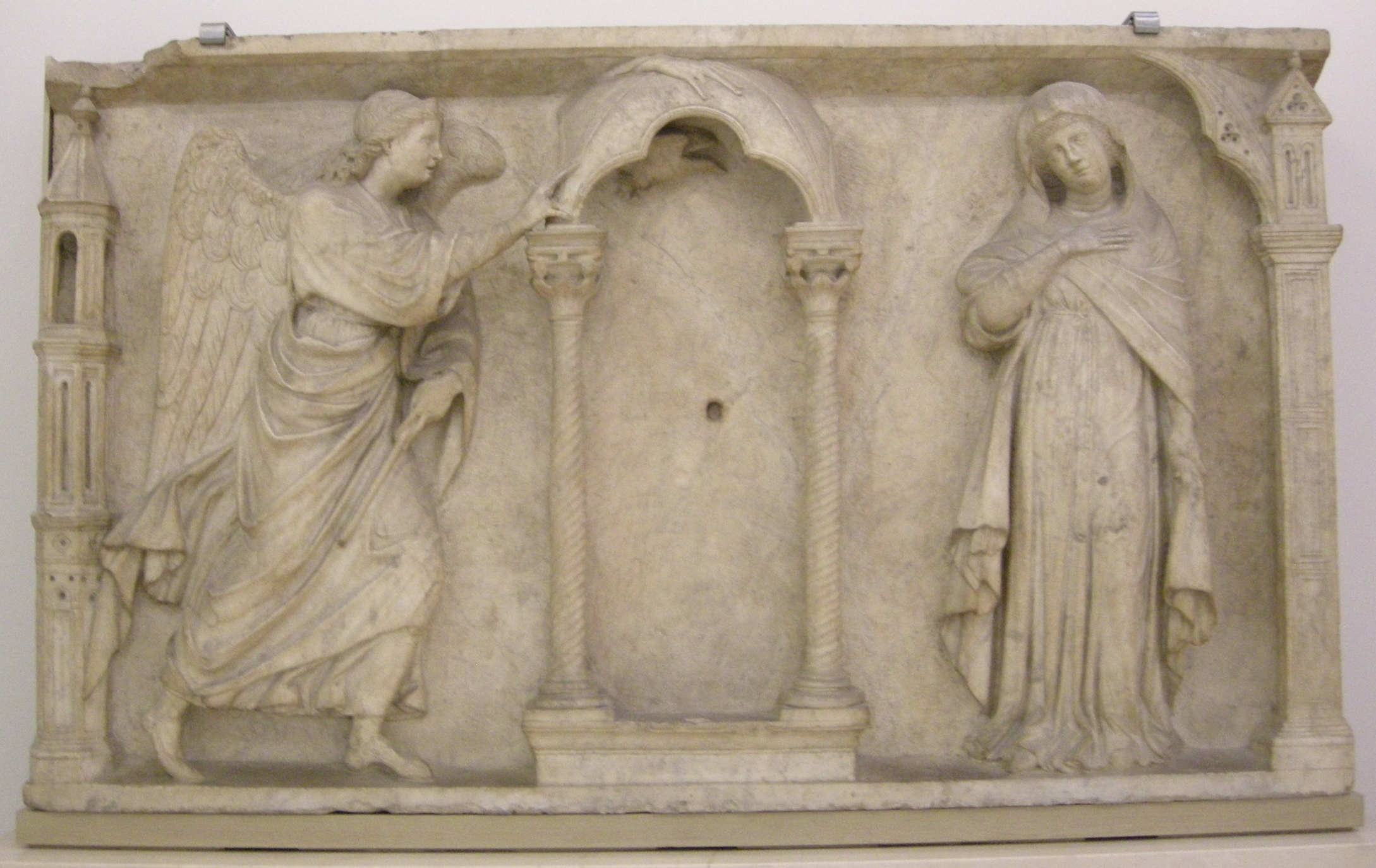 Arnolfo di cambio, annunciazione, 1295-1302 ca., dal chiostro di santa maria maggiore